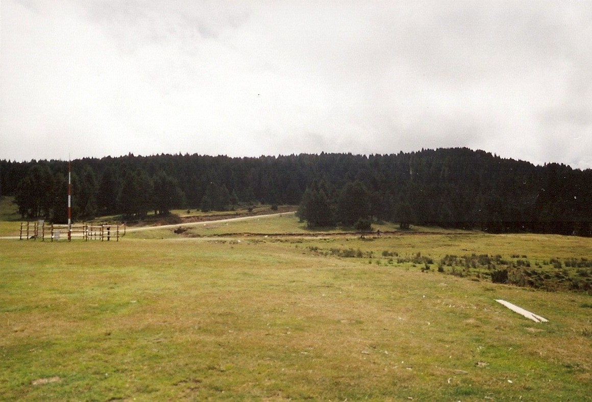 Départ des pistes et sentiers du Plateau de Beille